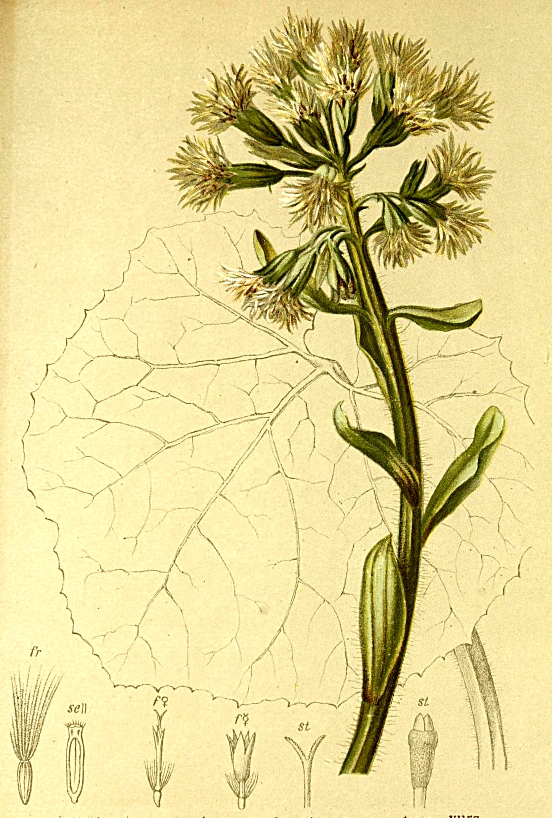 Petasites niveus (Petasites paradoxus)